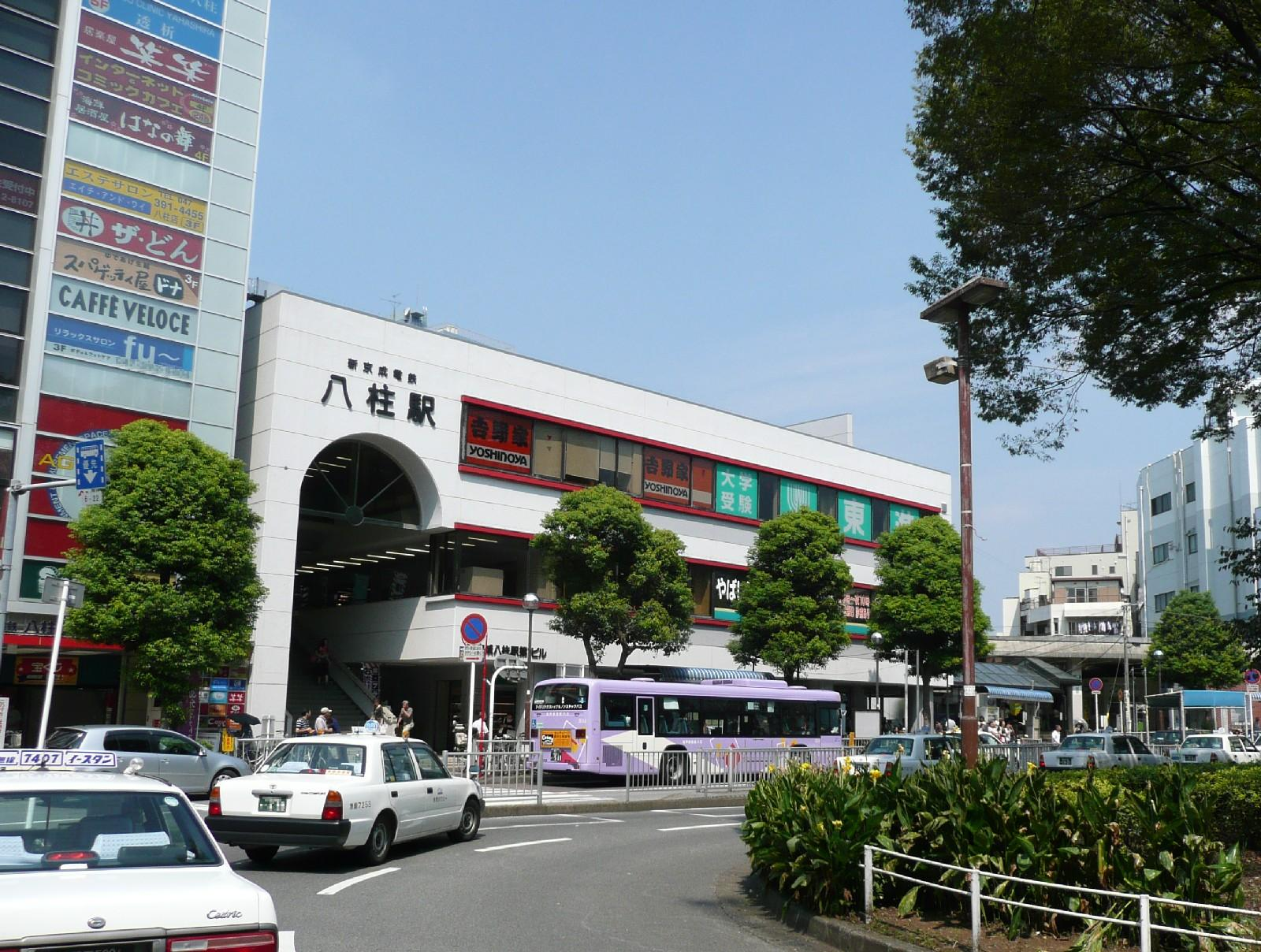 八柱駅南口